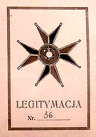 Odznaka pamiątkowa - Szwadronu Pionierów